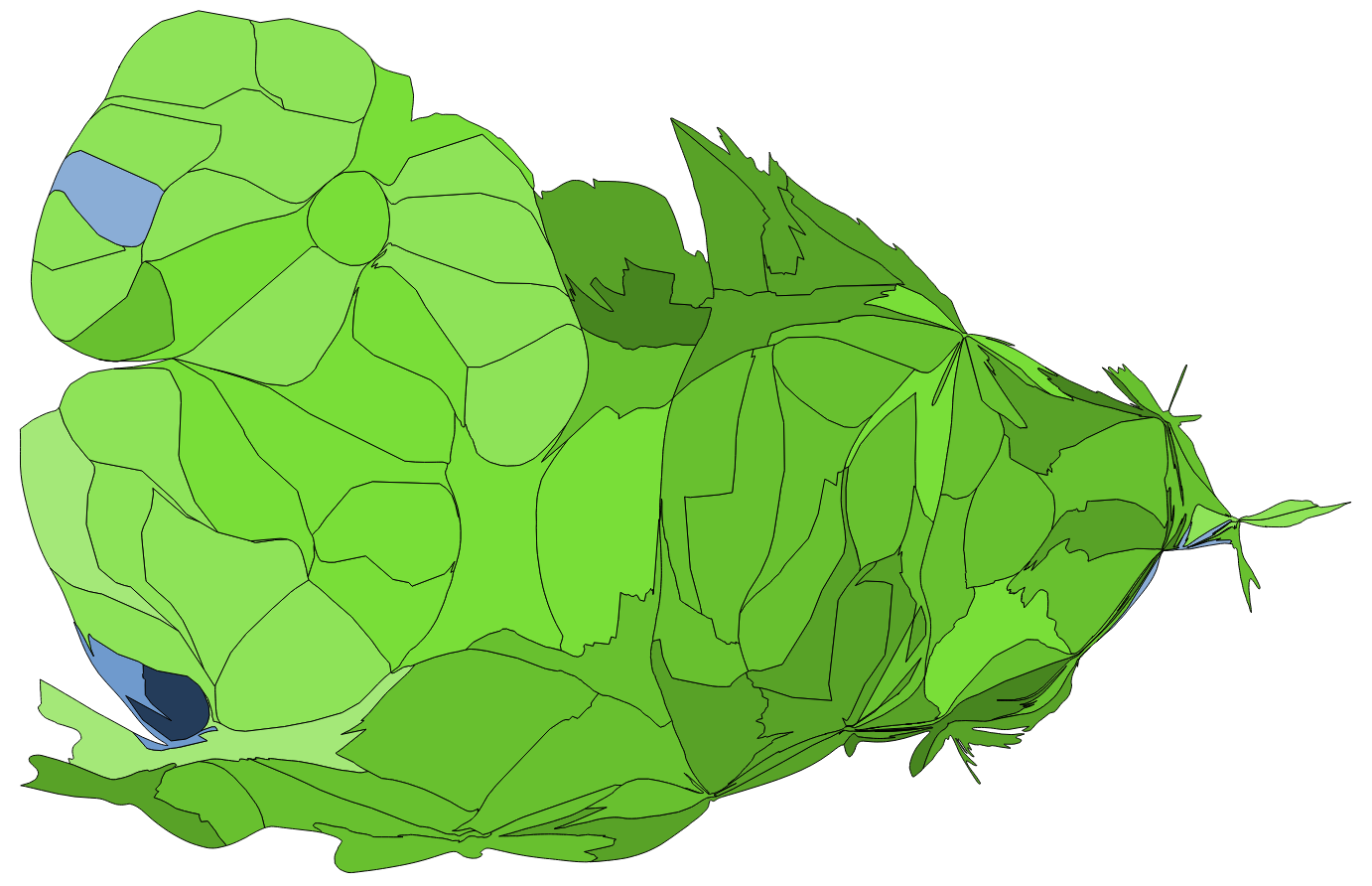 中文（台灣）: 顏色對照表